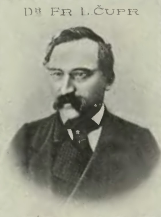 Portrét – František Čupr (1821-1882), Český filozof, pedagog a politik.